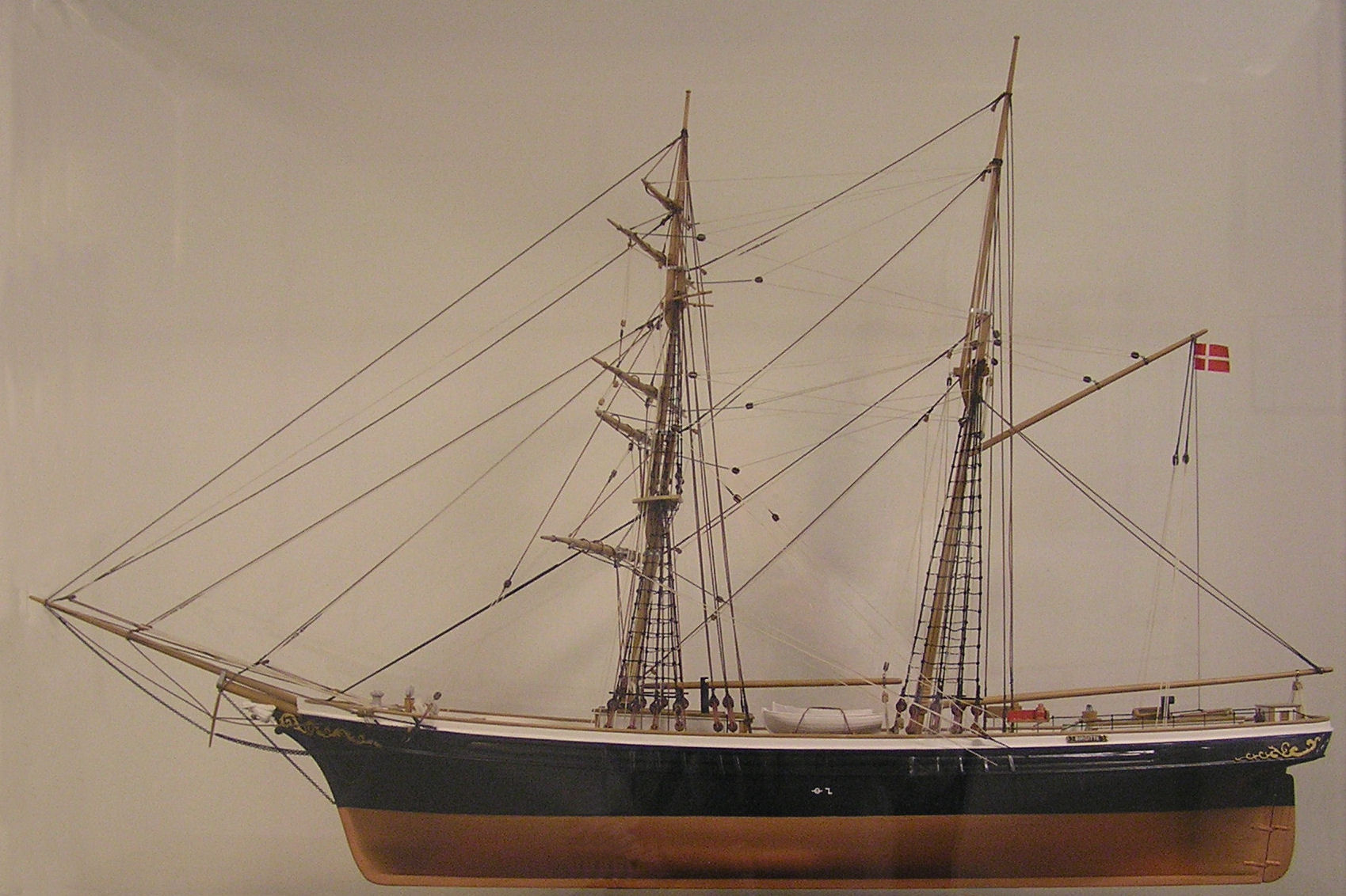 'Birgitte' 2 master skonnert bygget af Ove Andersen, Slagelse i 1976. Blev 26.april 1976 givet som gave til Marienlund Plejecenter, Drejøgade 1 B, 5000 Odense Skonnertbriggen Birgitte, blev bygget på Hans Lind Hansens Værft i Skibhusene, Odense 1874-75. Birgitte var tegnet af Lind Hansens søn, Niels Frederik Hansen. Birgitte på 139 BR blev leveret til sparekassedirektør H.Th Helweg